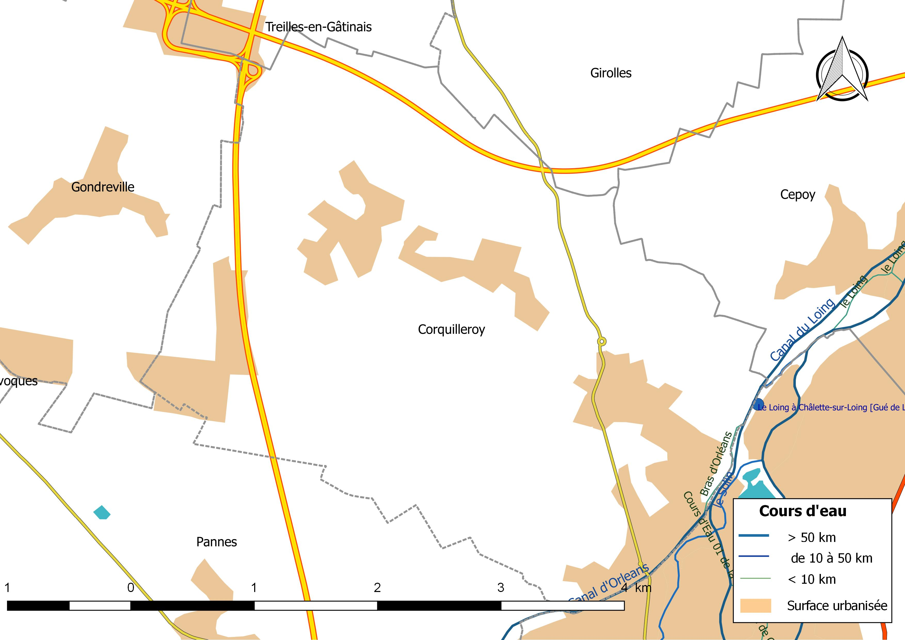 Carte du réseau hydrographique de la commune de Corquilleroy (France).